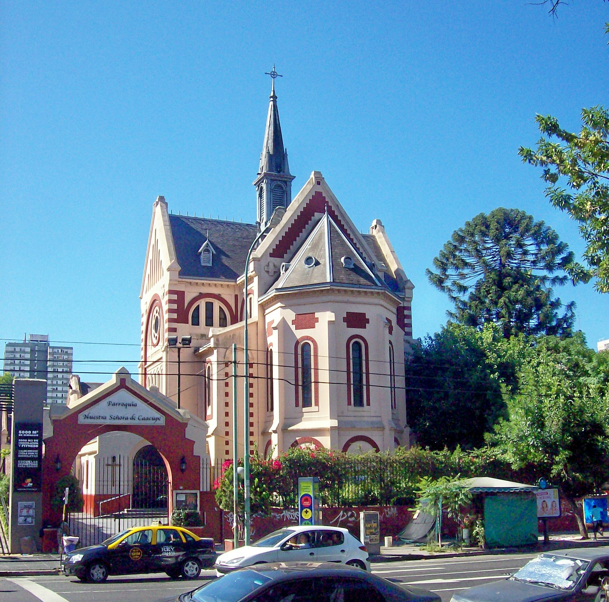 Parroquia Nuestra Señora de Caacupé, obra del arquitecto noruego Alejandro Christophersen. Formó parte de la antigua Quinta Wanklyn. Rivadavia 4879, Ciudad de Buenos Aires, Argentina.